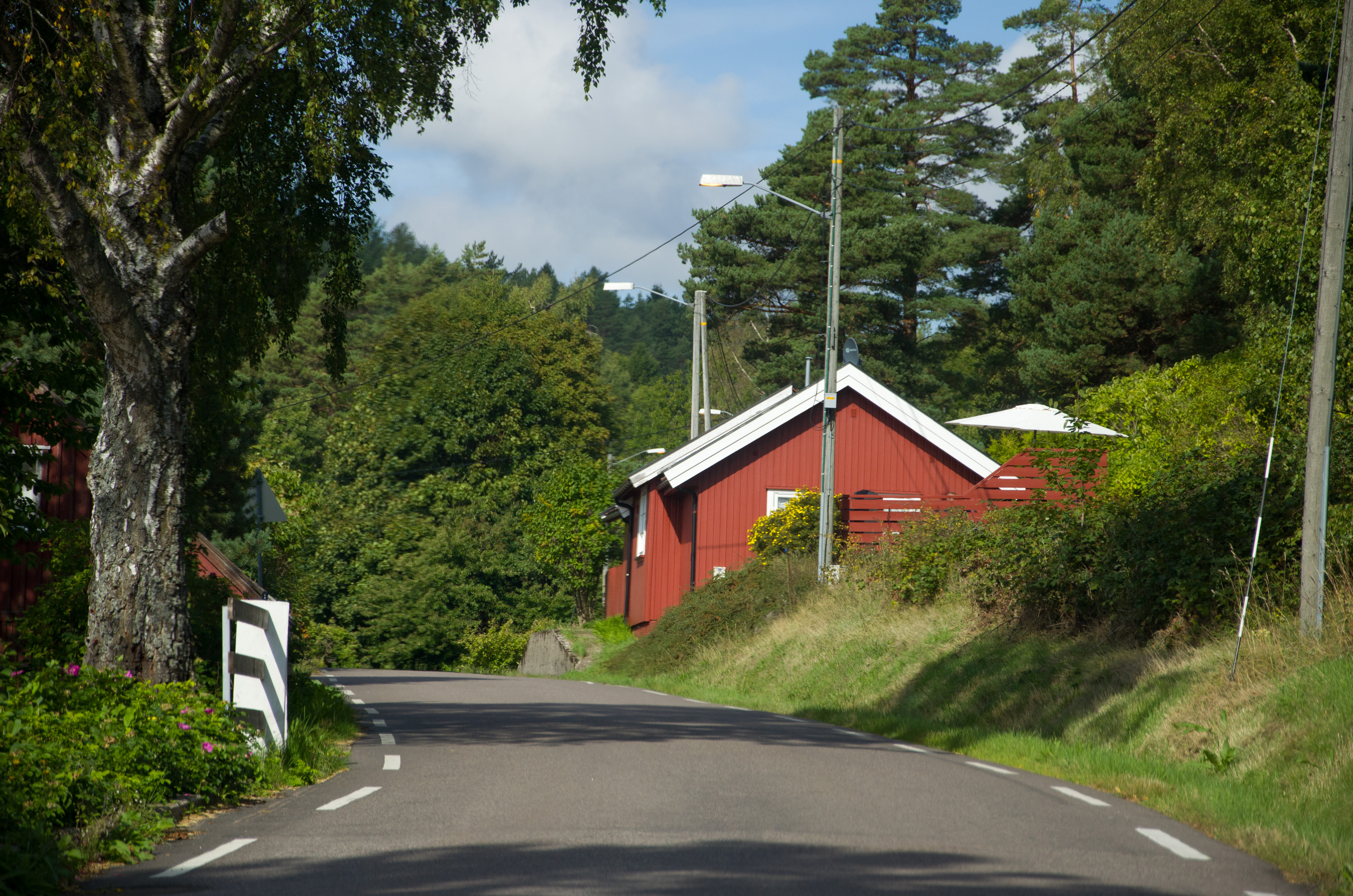 Fylkesvei 392 Mågerødveien på Tjøme i Vestfold